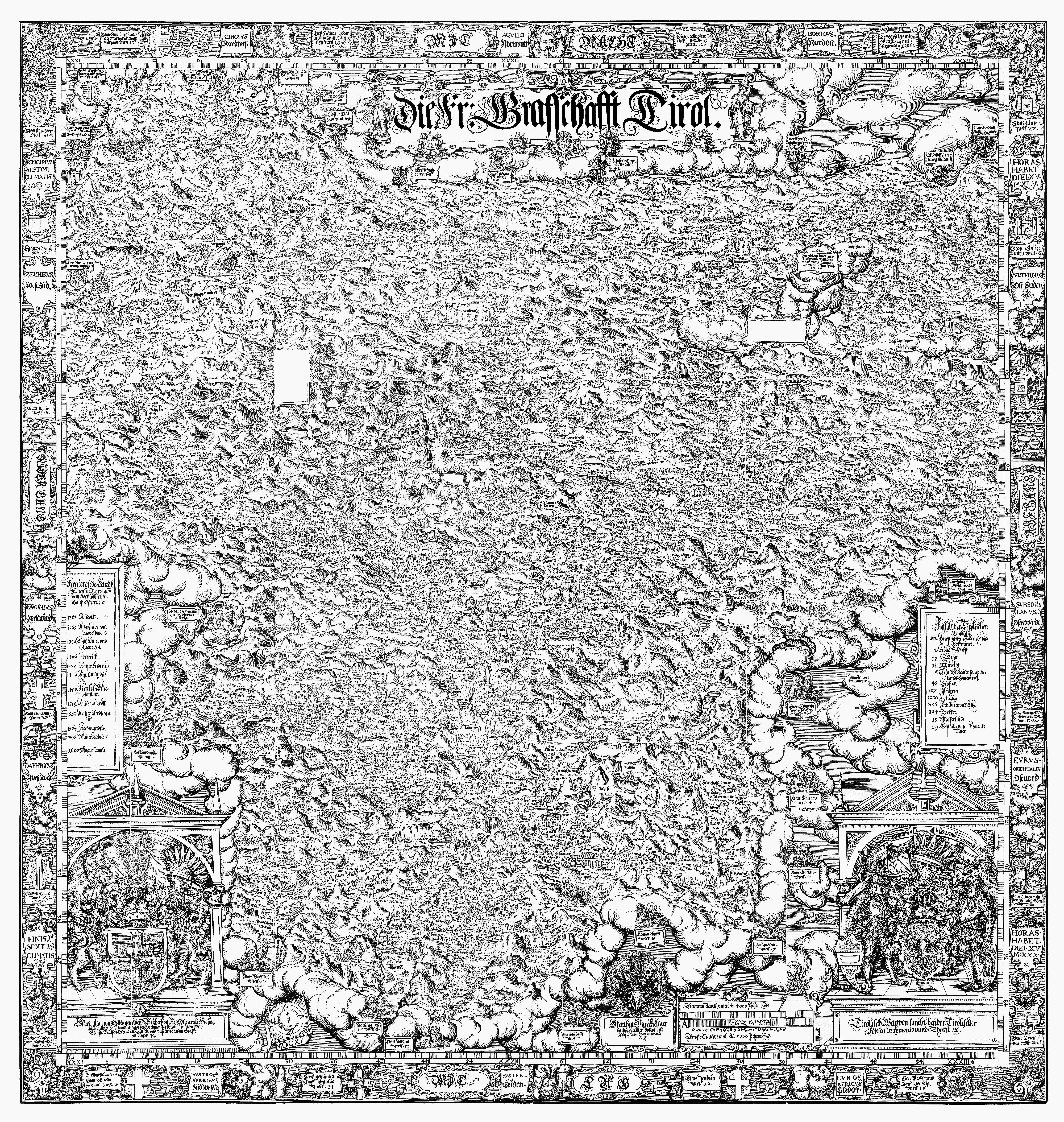 Mathias Burglechner, Tirolische Landtafeln, 1611.